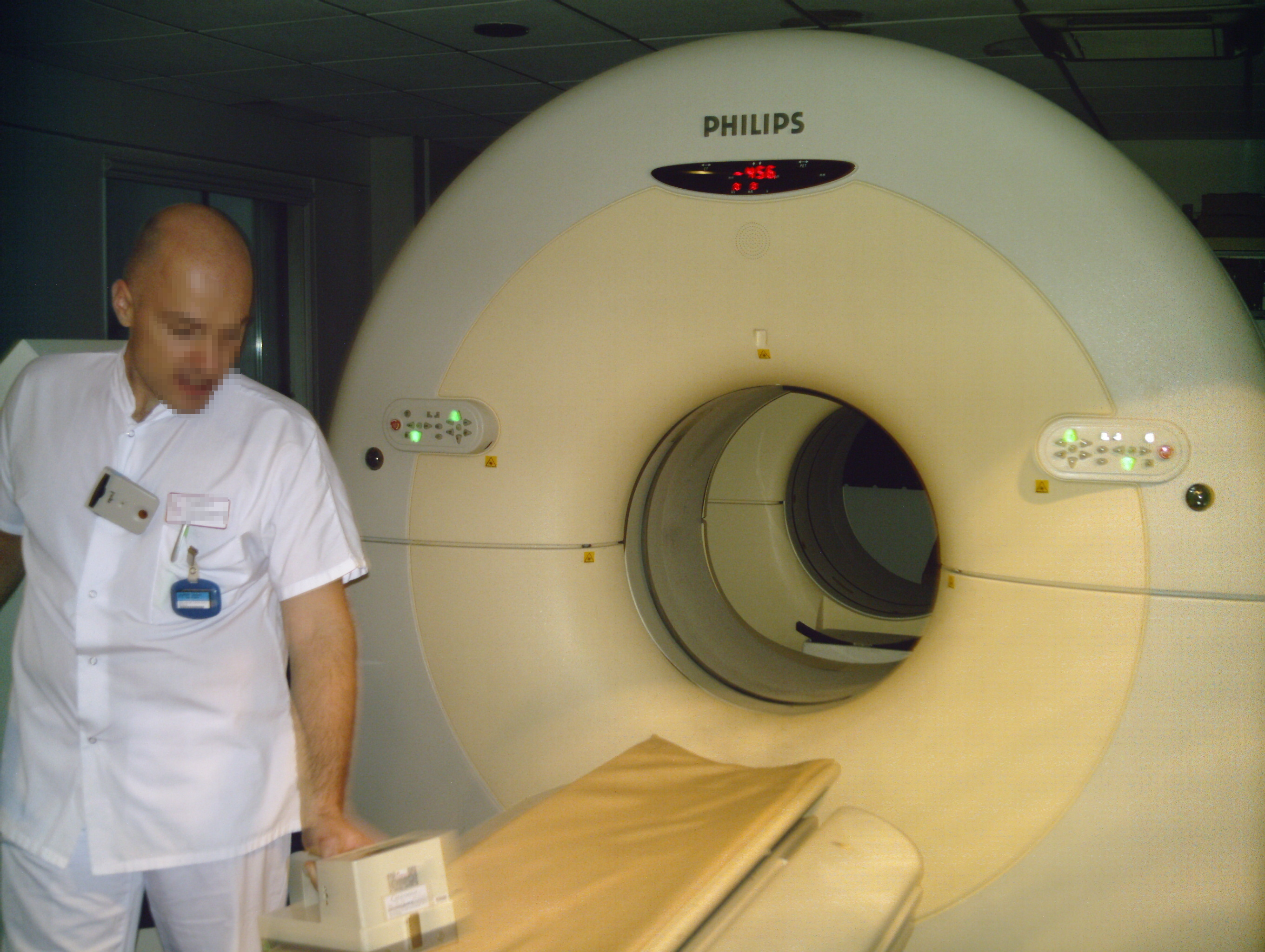 Illustration d'un TEP-scanner avec manipulateur en électroradiologie médicale effectuant des mesures de radioactivité en fin de journée.